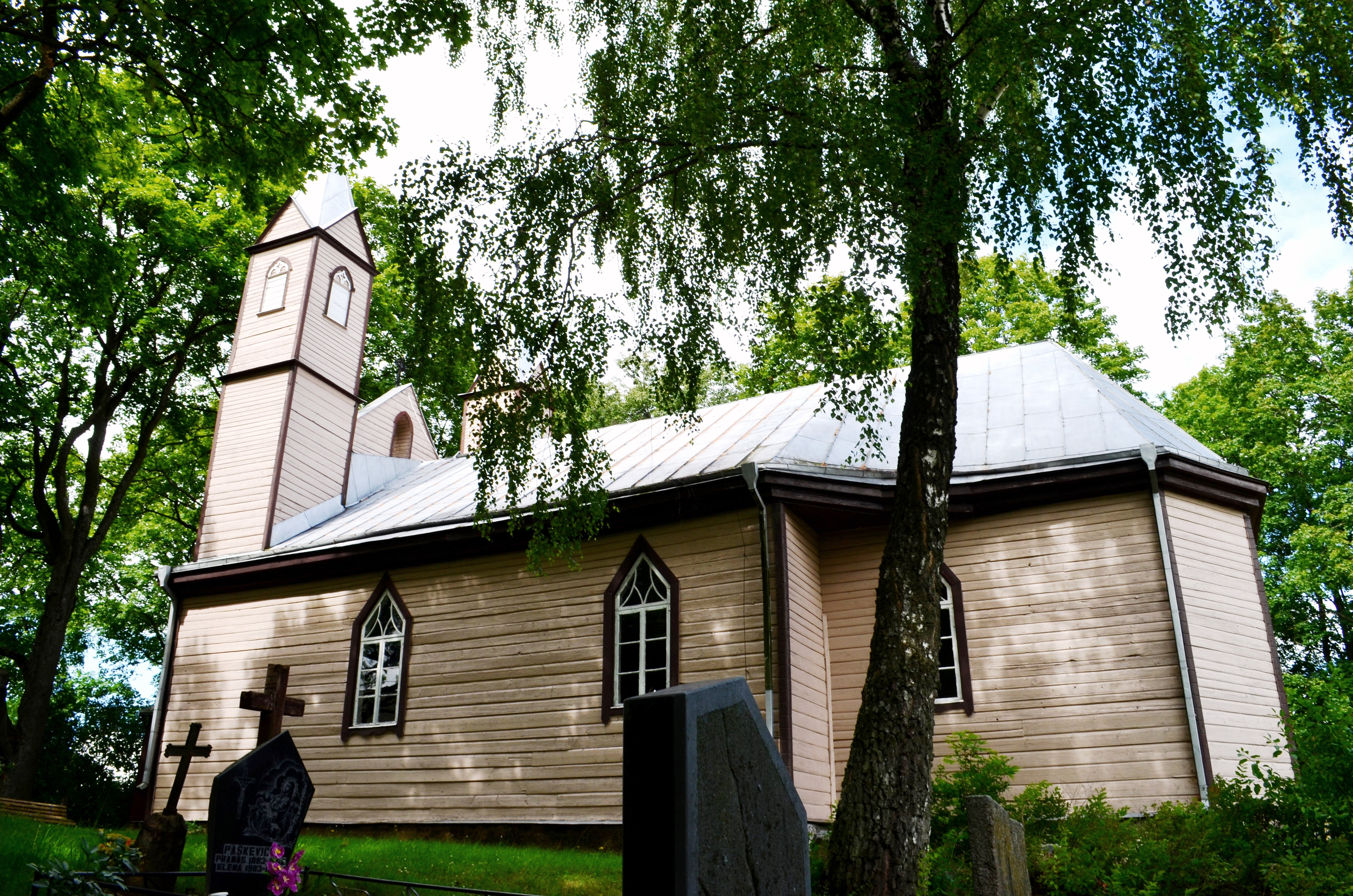 Vadaktėlių bažnyčia, Panevėžio raj.